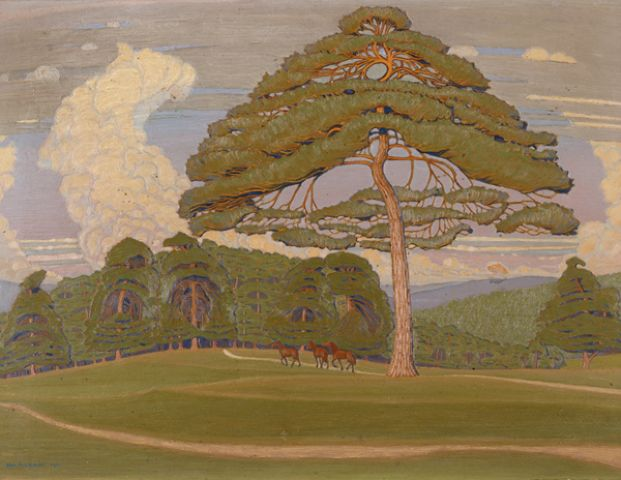 Les pins, val d’Orvin sur Bienne. Öl auf Holz. 30 x 40 cm